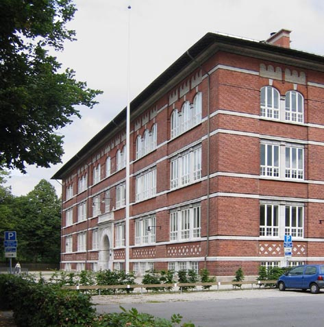 Mellersta Förstadsskolan, Malmö (Konsthögskolan)